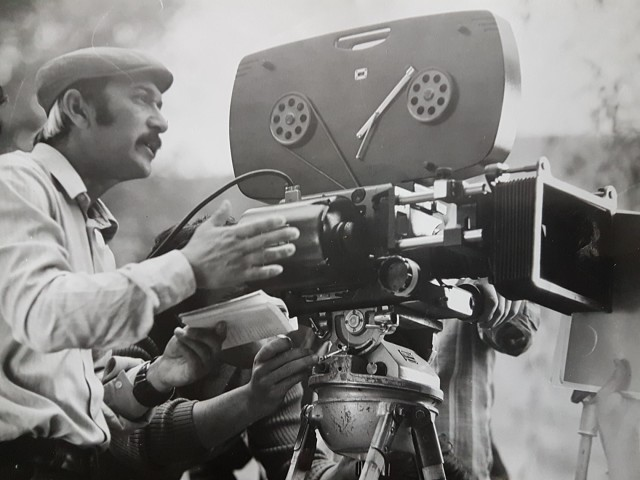 Киностудия Таджикфильм